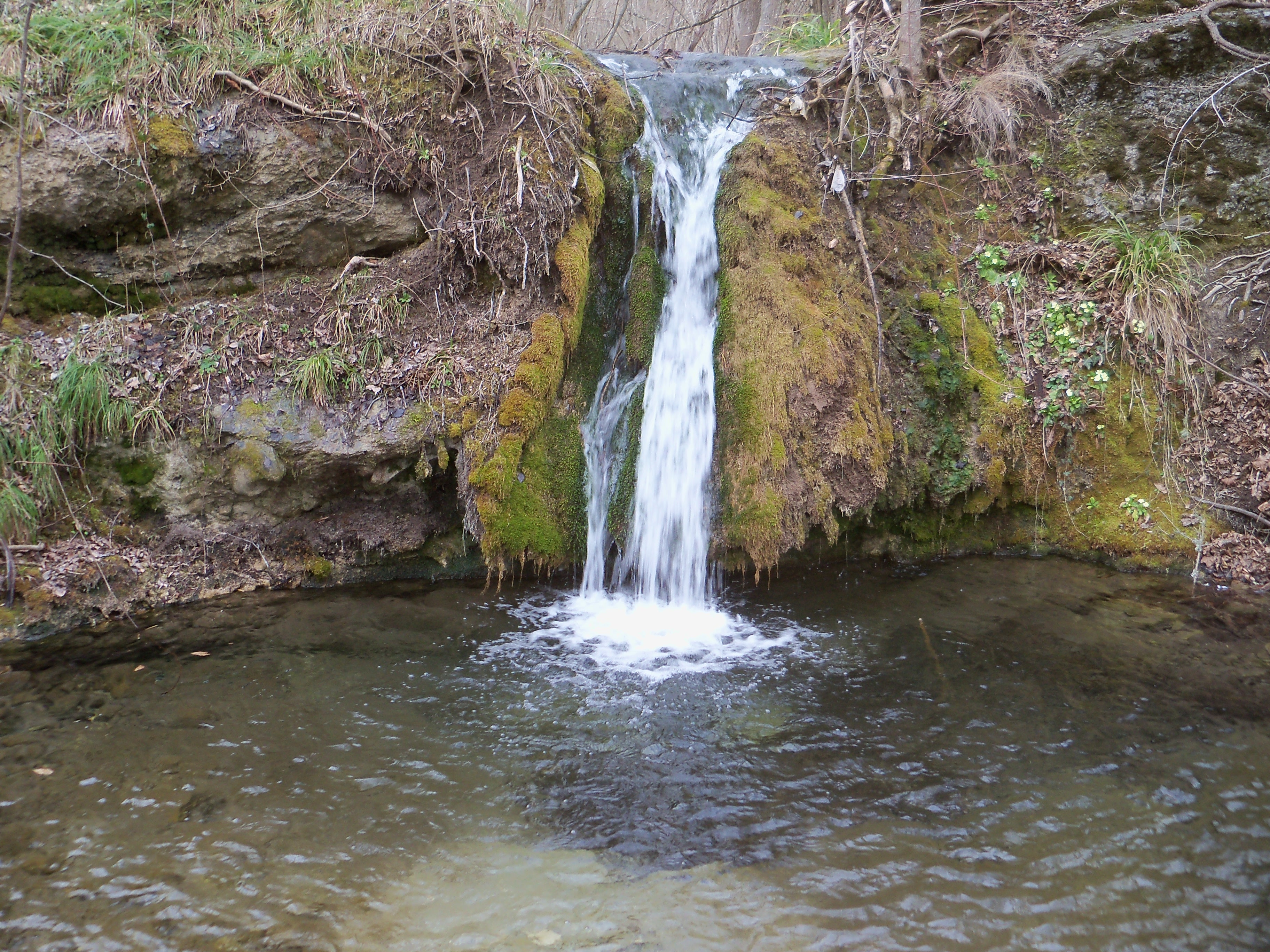 Фото